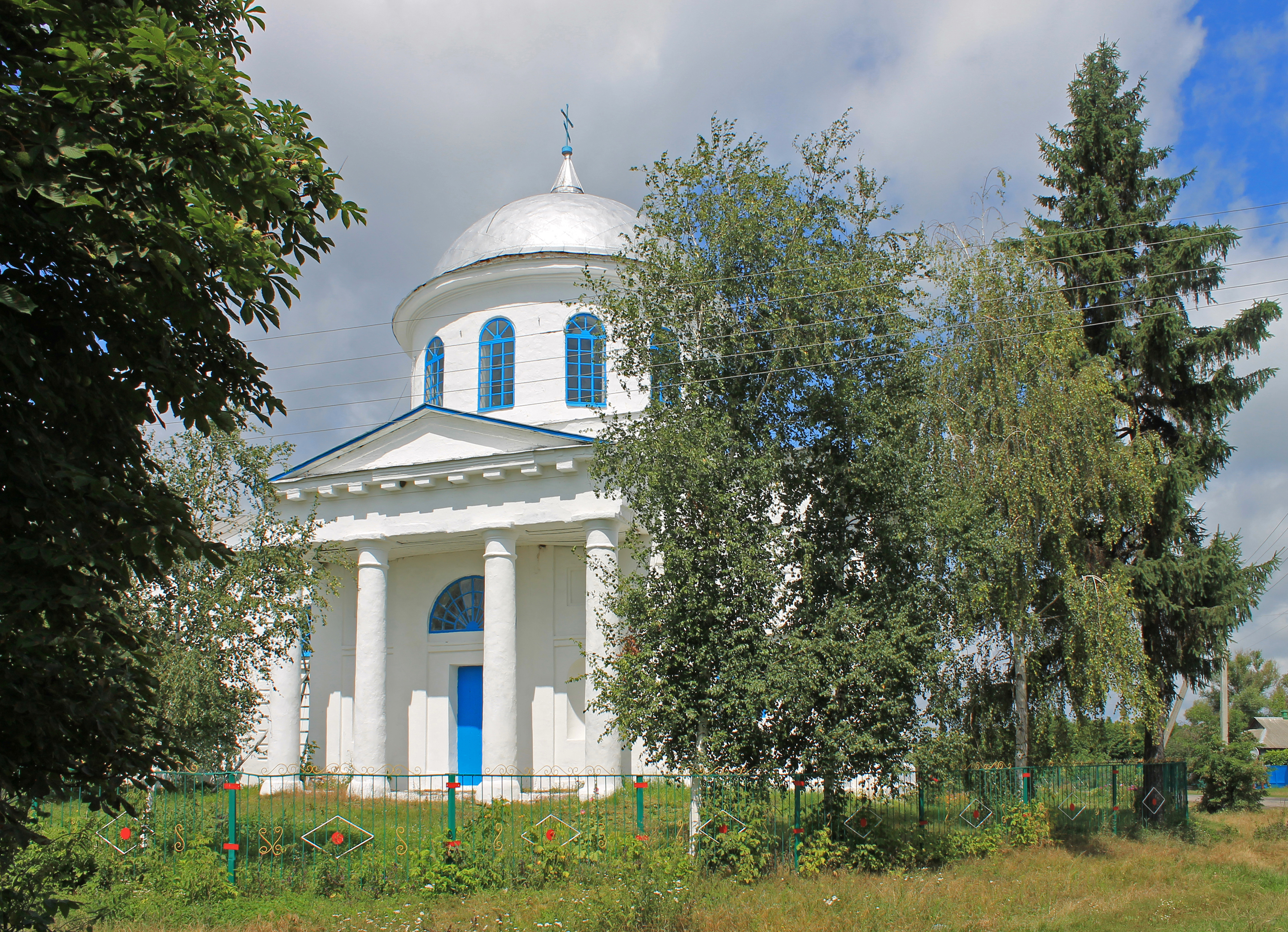 Миколаївська церква 1800р., с.Семереньки, Тростянецький р-н., Сумська обл.